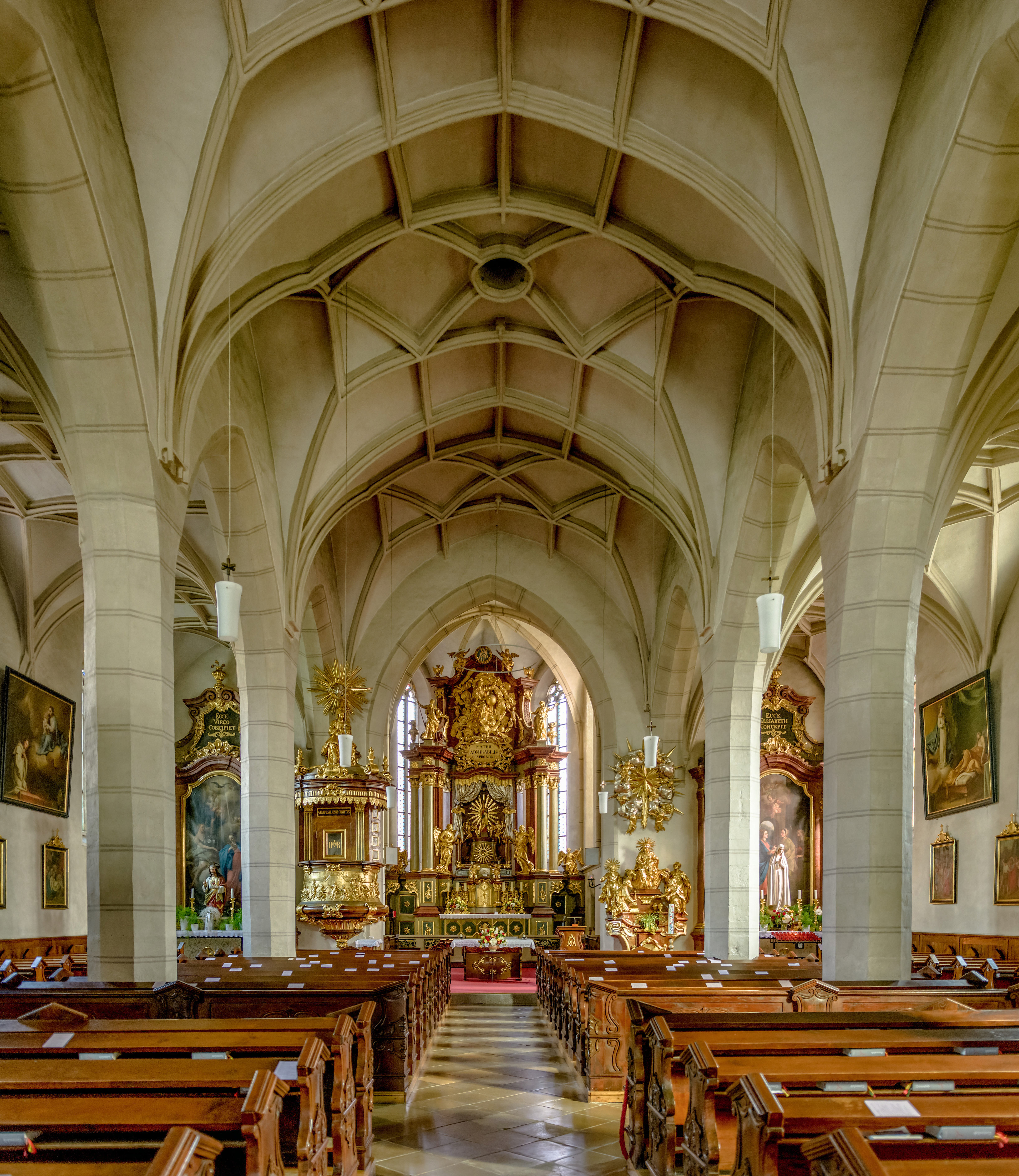 Kath. Pfarrkirche Mariae Himmelfahrt